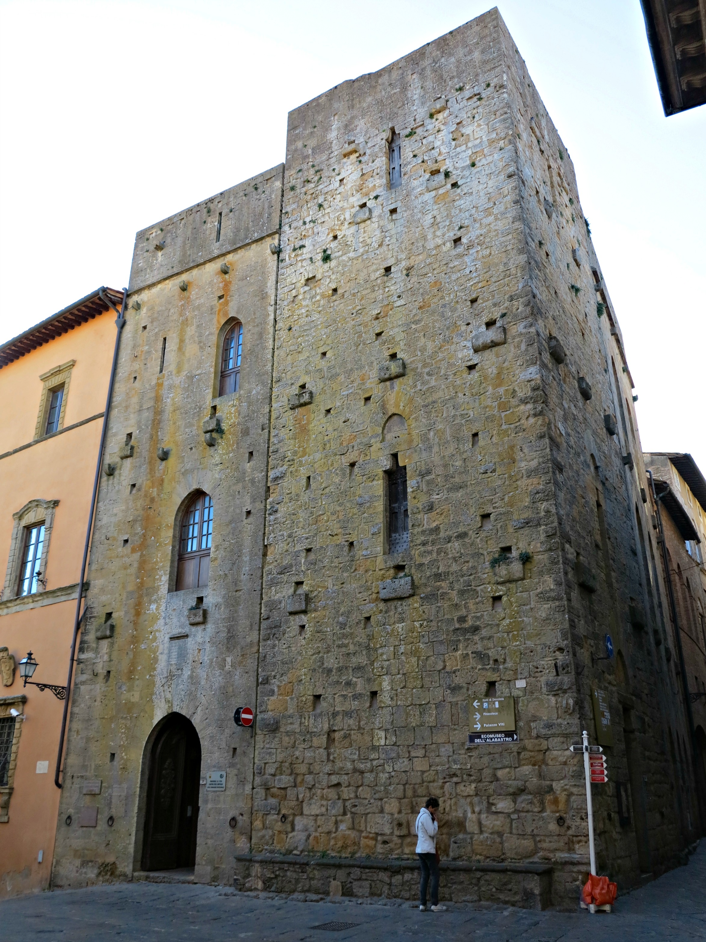 Torre Toscano This is a photo of a monument which is part of cultural heritage of Italy.